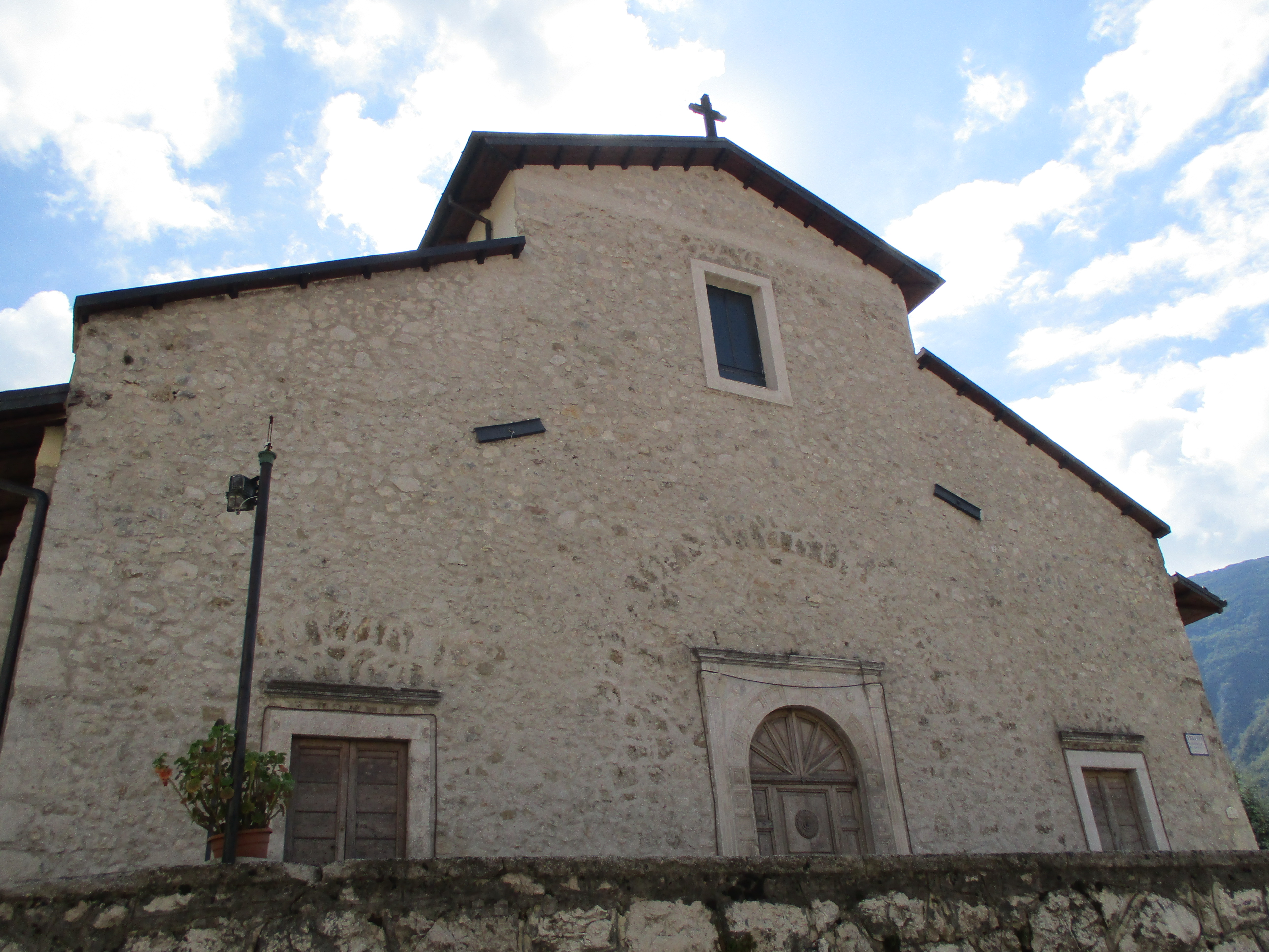 Facciata della chiesa di San Nicola